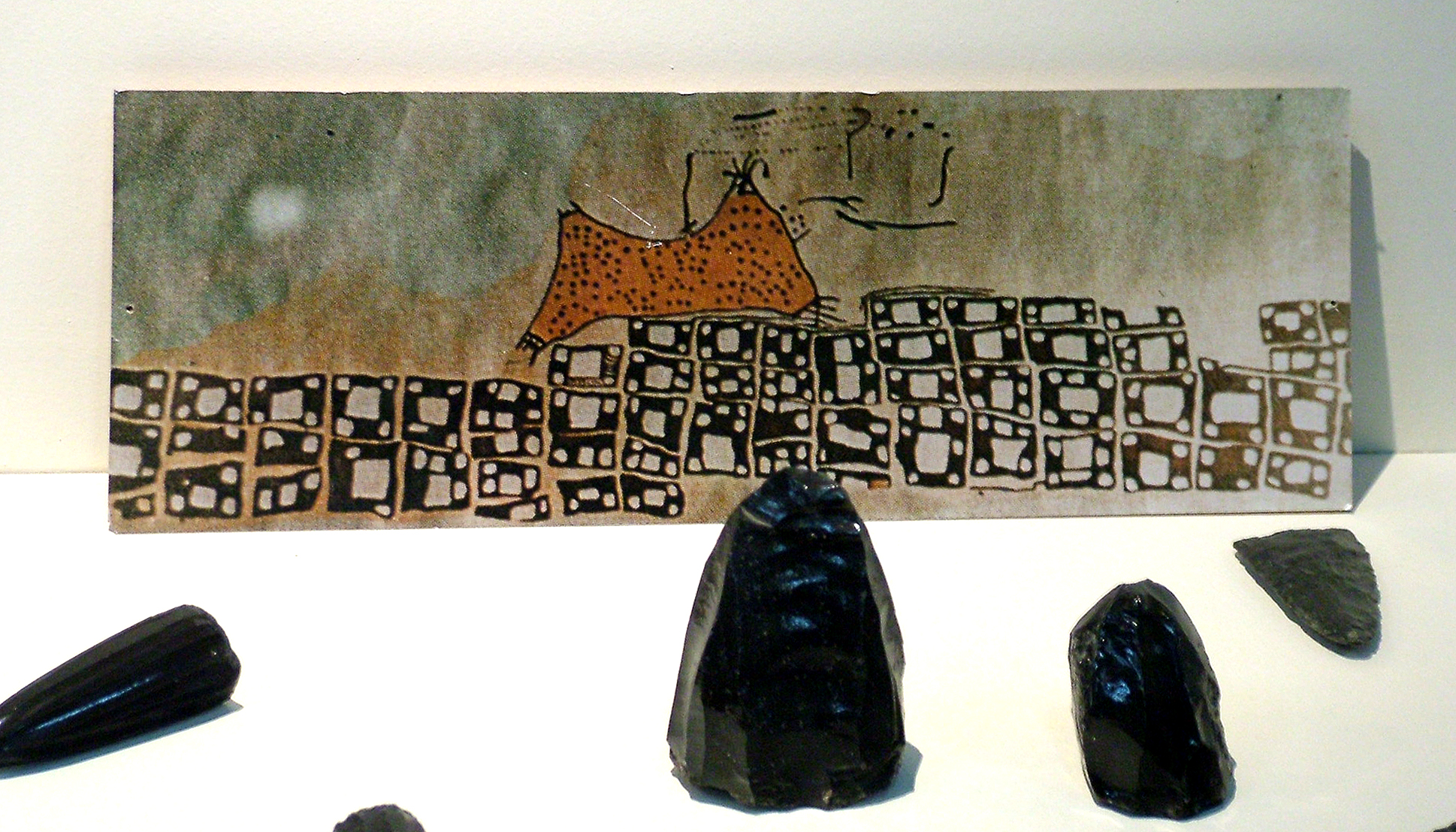 Catalhüyüki freskórészlet, előtérben obszidián magkövek (Anatóliai Civilizációk Múzeuma, Ankara, Törökország)